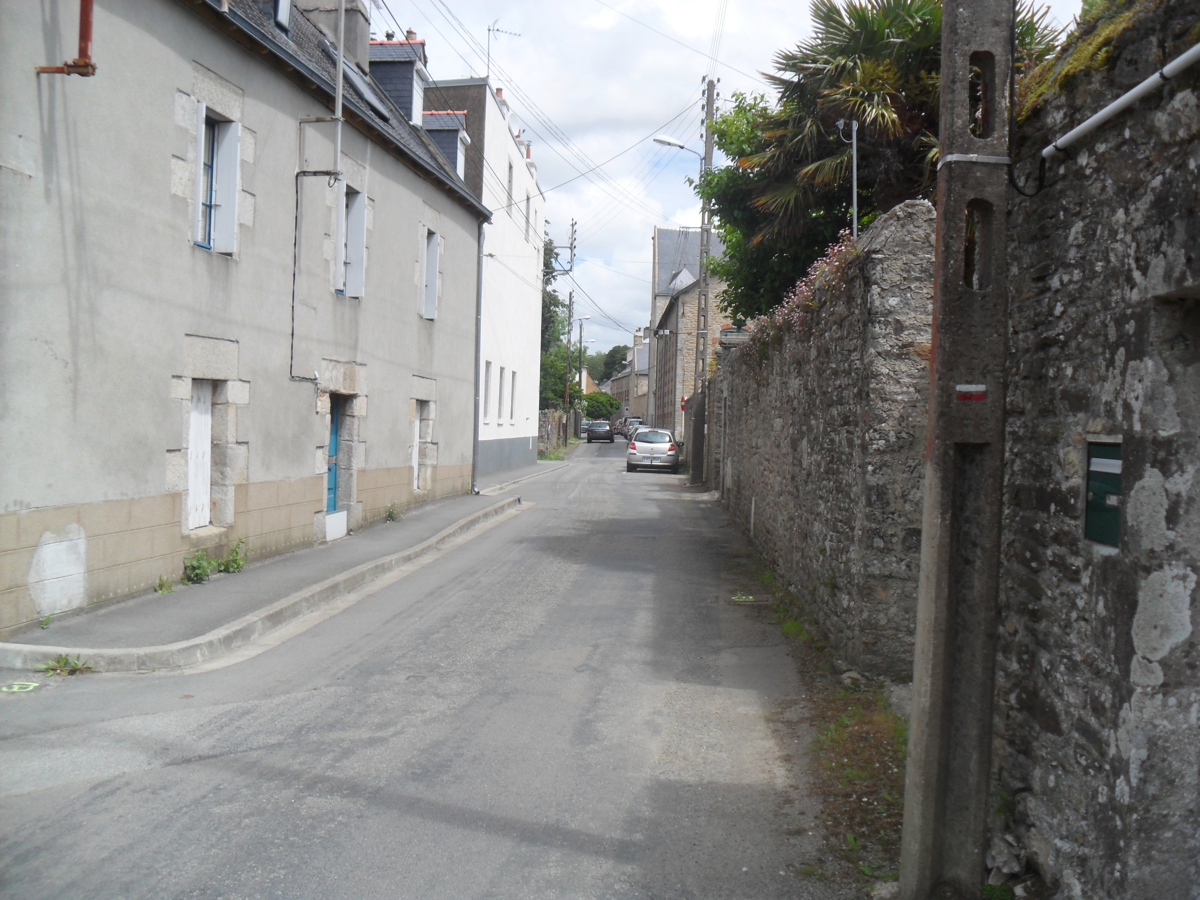 Rue à Locmaria, Quimper (France)